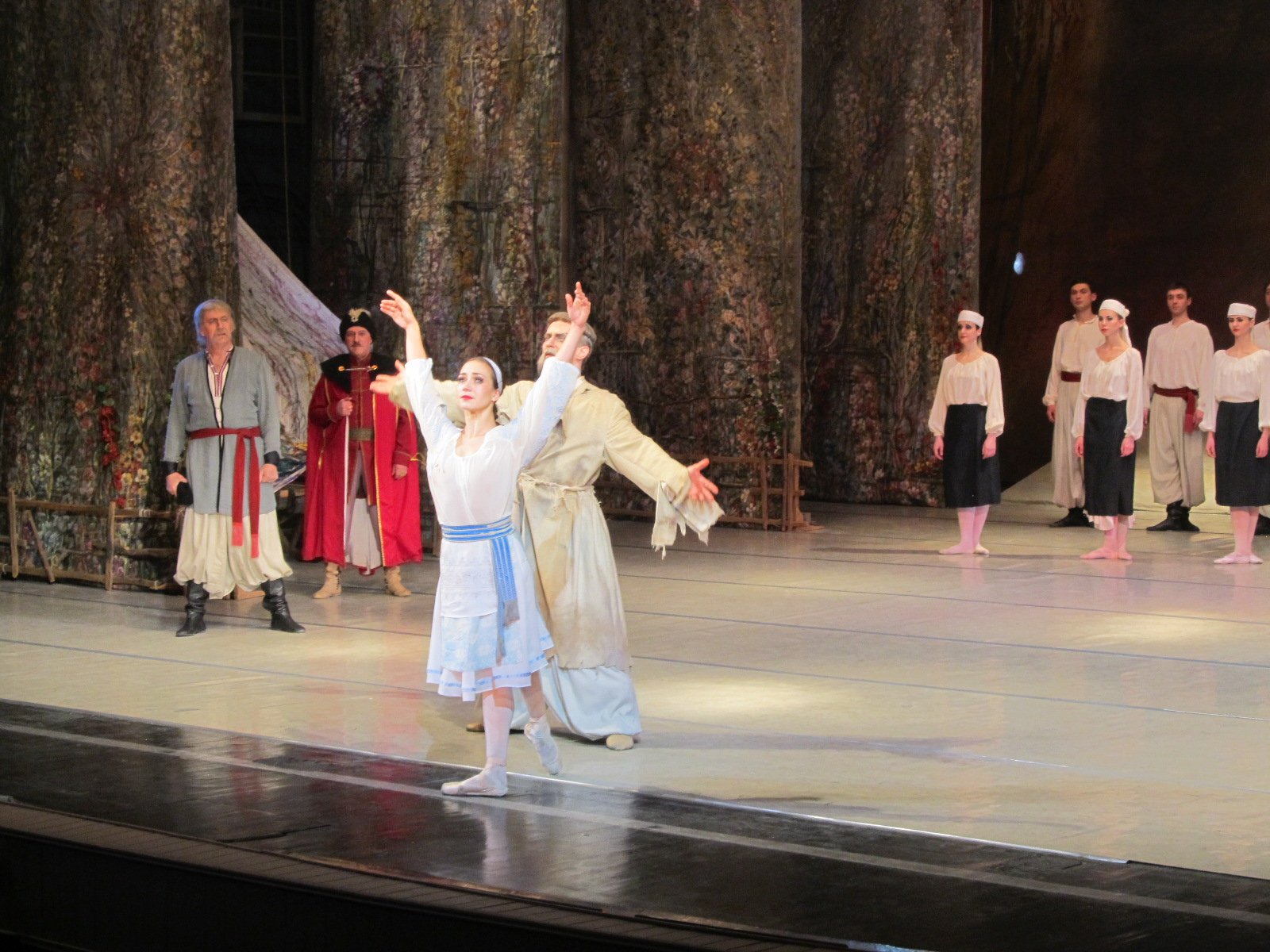 Вдячність.